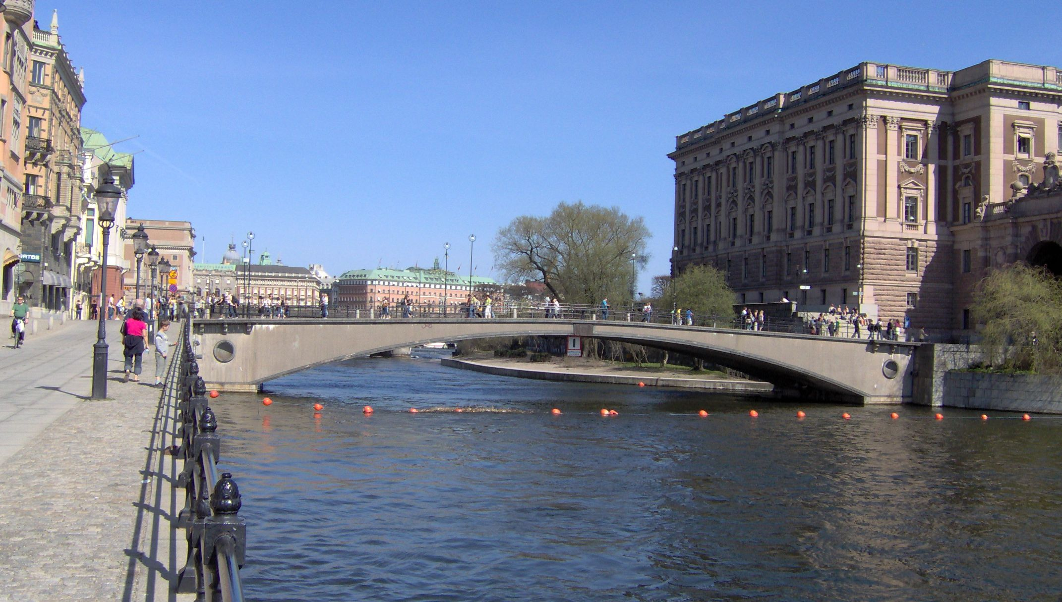 Riksbron, Stockholm, Sweden. 2006